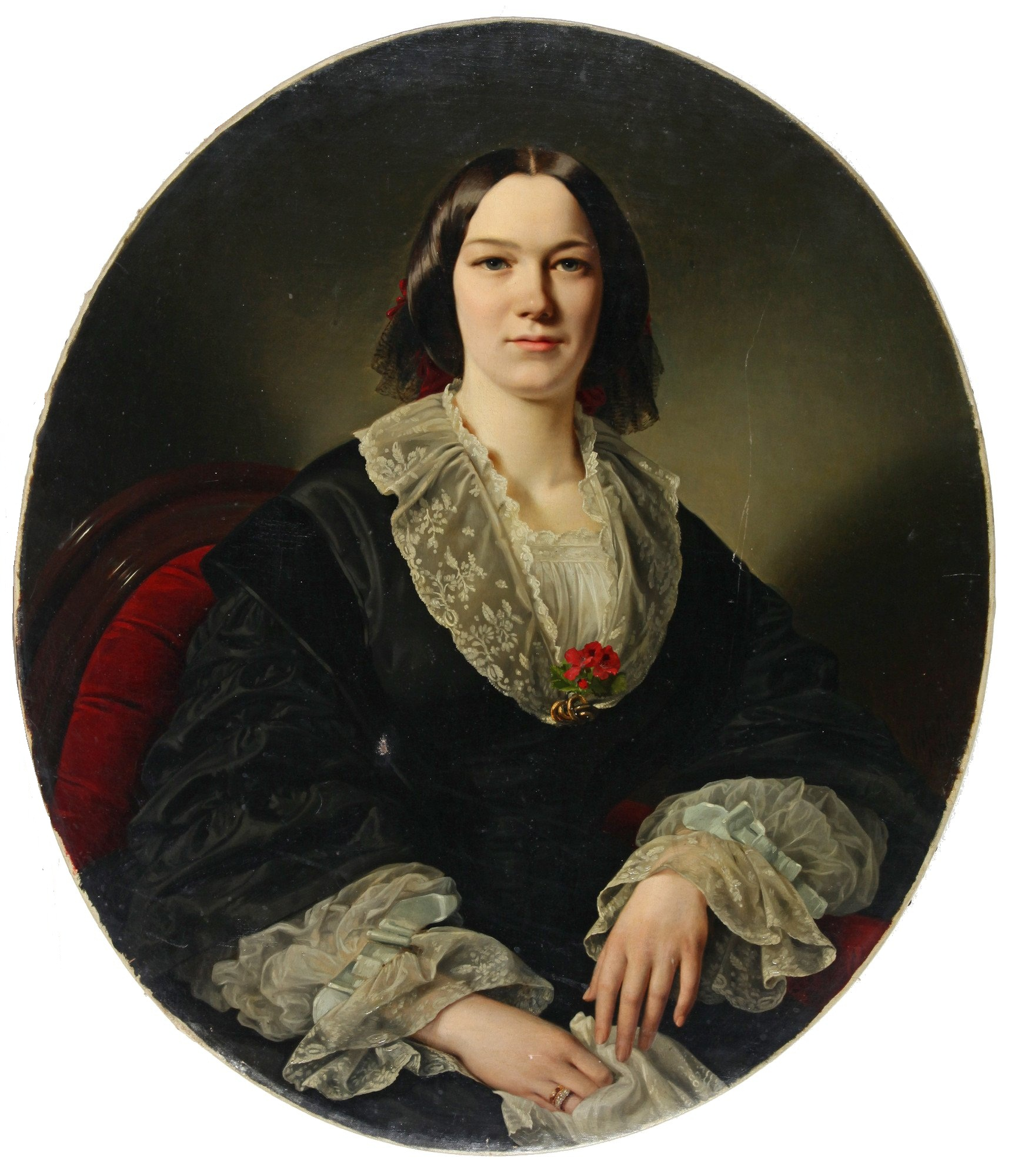 Das porträtierte Paar gehörte zu den aufstrebenden Kaufmannsfamilien Bremens in der zweiten Hälfte des 19. Jahrhunderts. Oltmann Thyen (1821 Apen/Oldenburg - 1891 Bremen) gründete 1851 die Schiffsreederei "O.Thyen" und heiratete im selben Jahr Maria S. R. Wilkens (1829 - 1867 Bremen), Tochter des Bremer Kaufmanns Georg Wilkens.[1] ↑ Reiss & Sohn